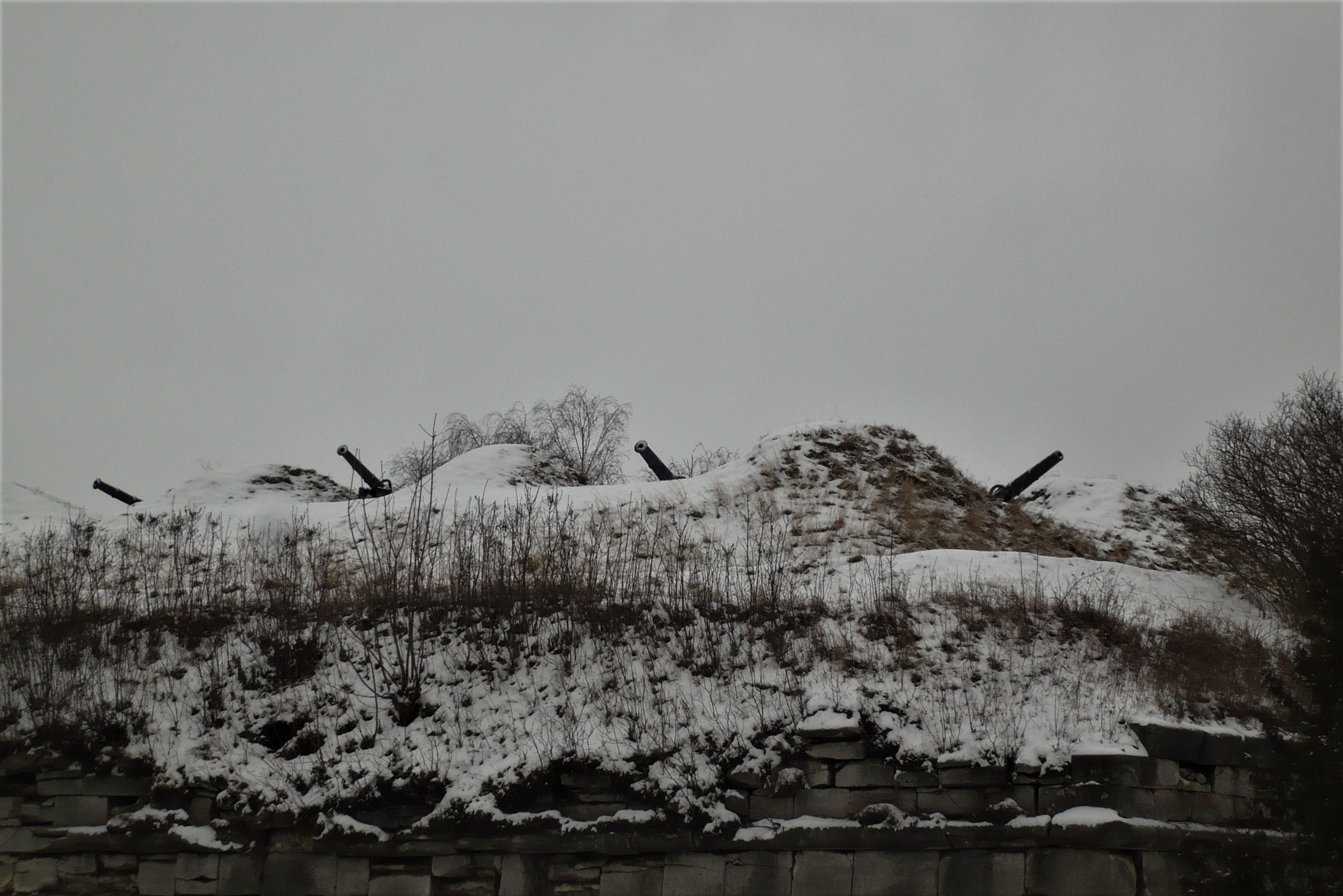 Zamek